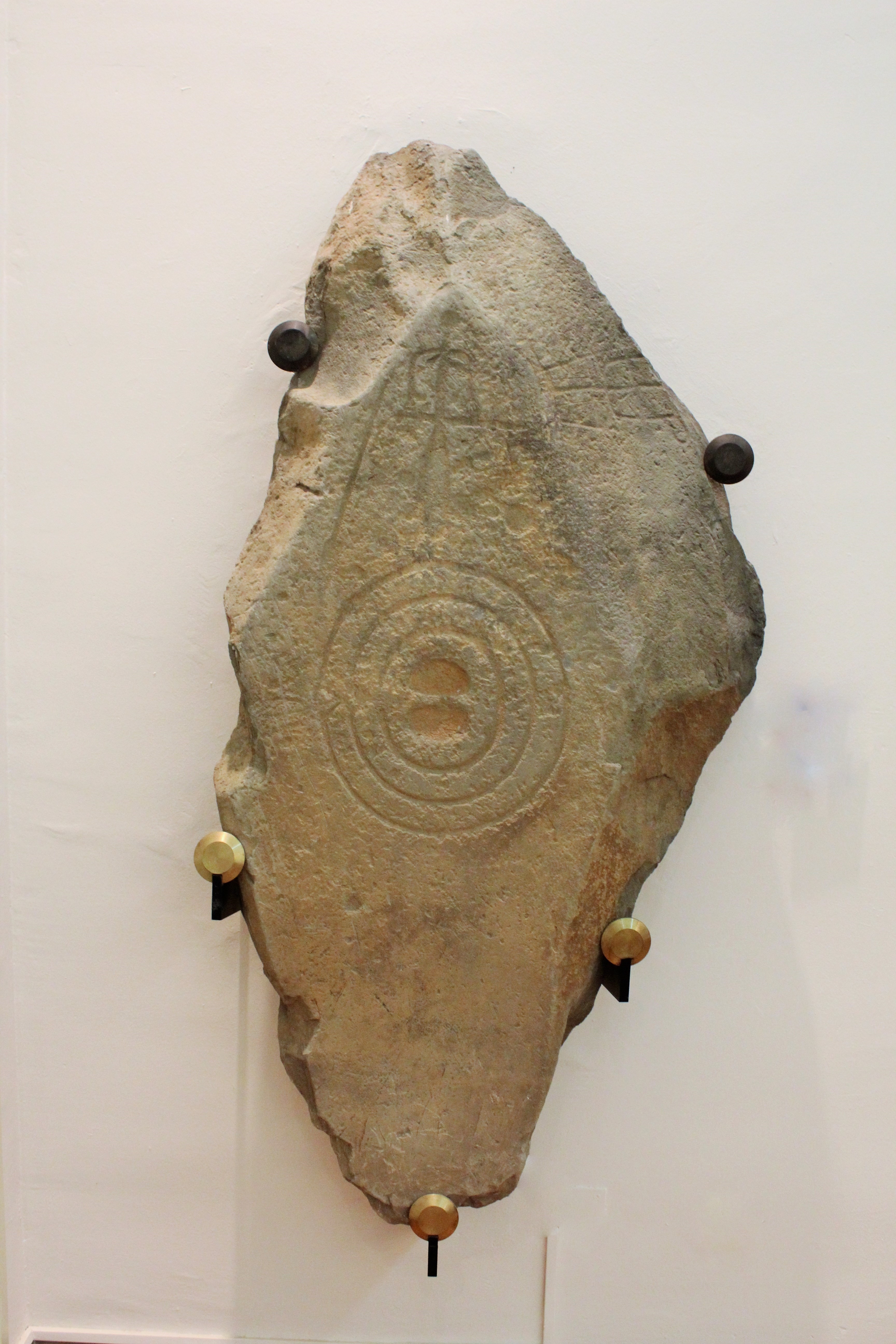 Protohistoria. Estela de guerrero. Siglo VIII-VII a.C. La Yuntilla Alta. Cabeza del Buey.